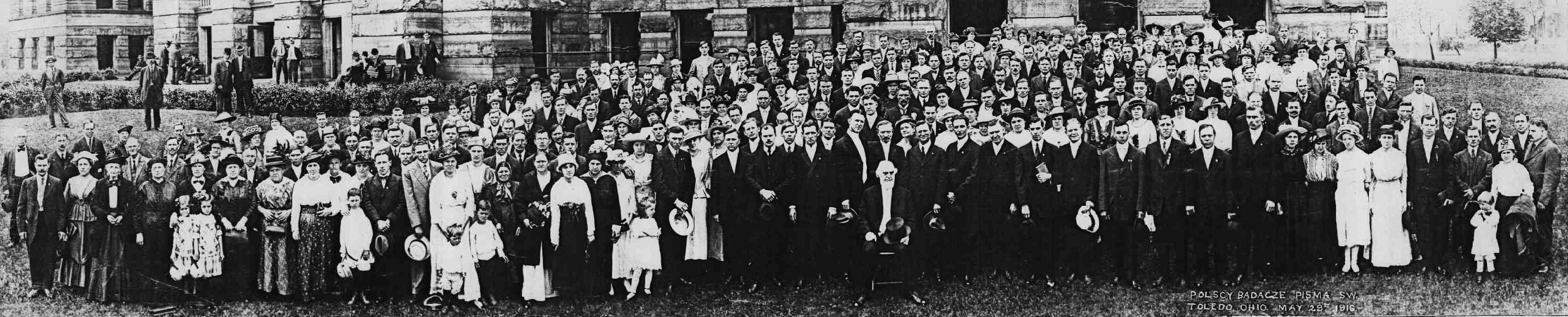 Uczestnicy polskiego zgromadzenie Badaczy Pisma Świętego – Toledo, 29 maja 1916. Obecnych około 300-400 osób. Wśród przemawiających byli: Charles Taze Russell, Hipolit Oleszyński, Czesław Kasprzykowski, W.S. Kołomyjski, W. Szczudło, Józef Krett i Fr. Szarek.